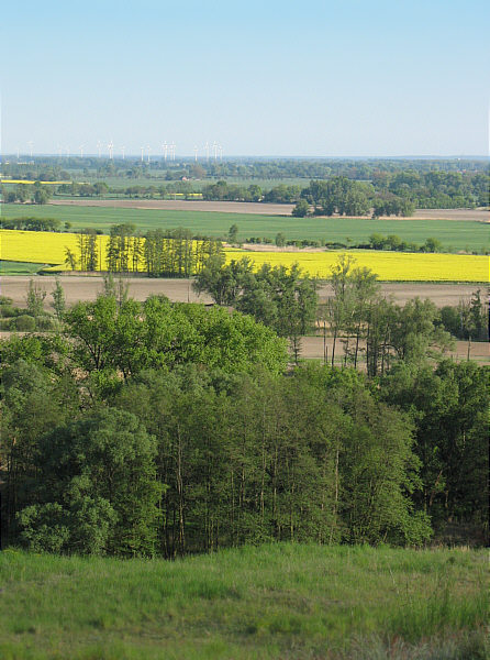 Blick nach Süden über das Oderbruch